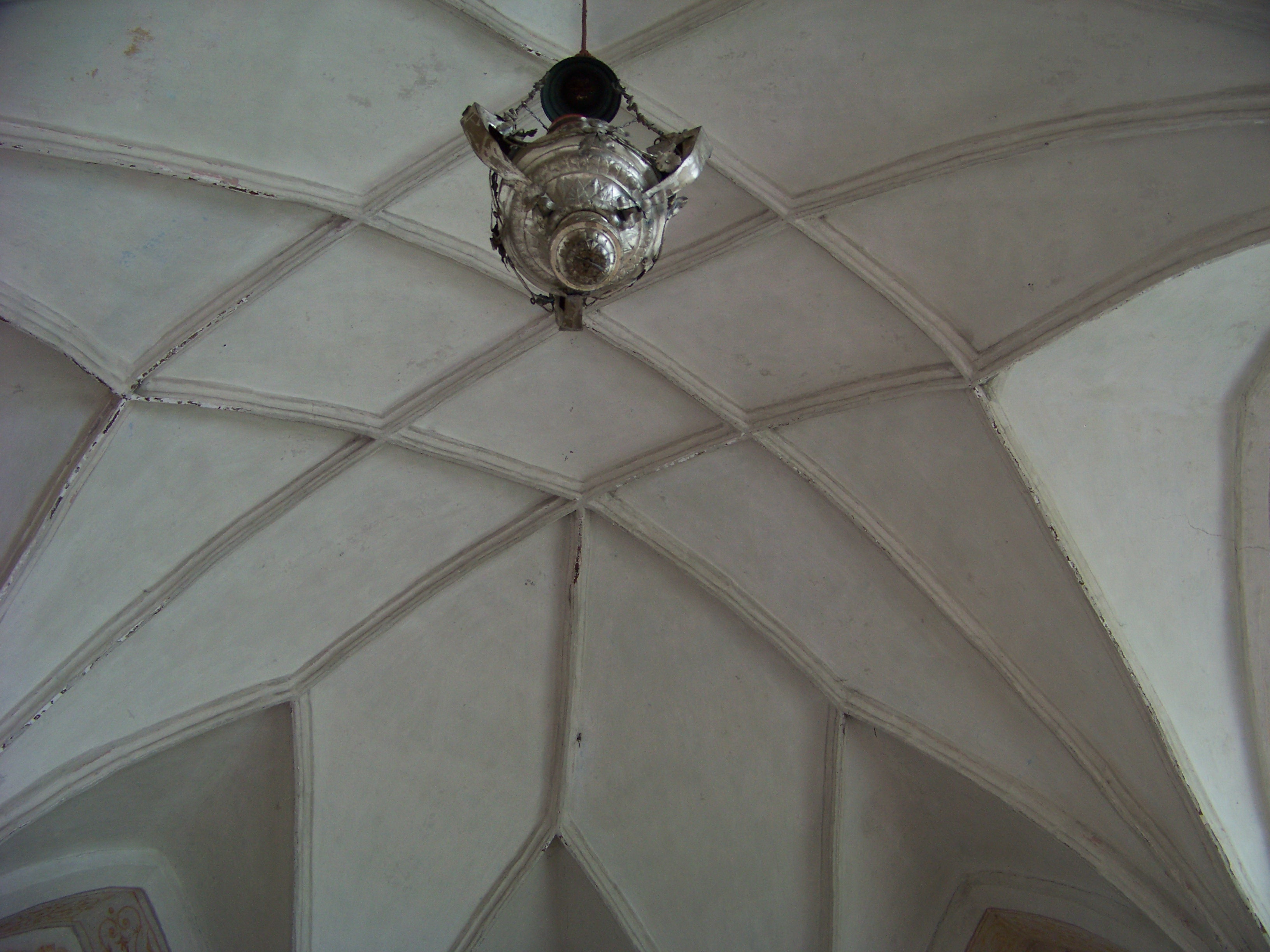 Adlkofen, Jenkofen 13. Katholische Kirche Mariä Himmelfahrt. Kreuzrippengewölbe im Chor mit Ewig-Licht-Ampel.